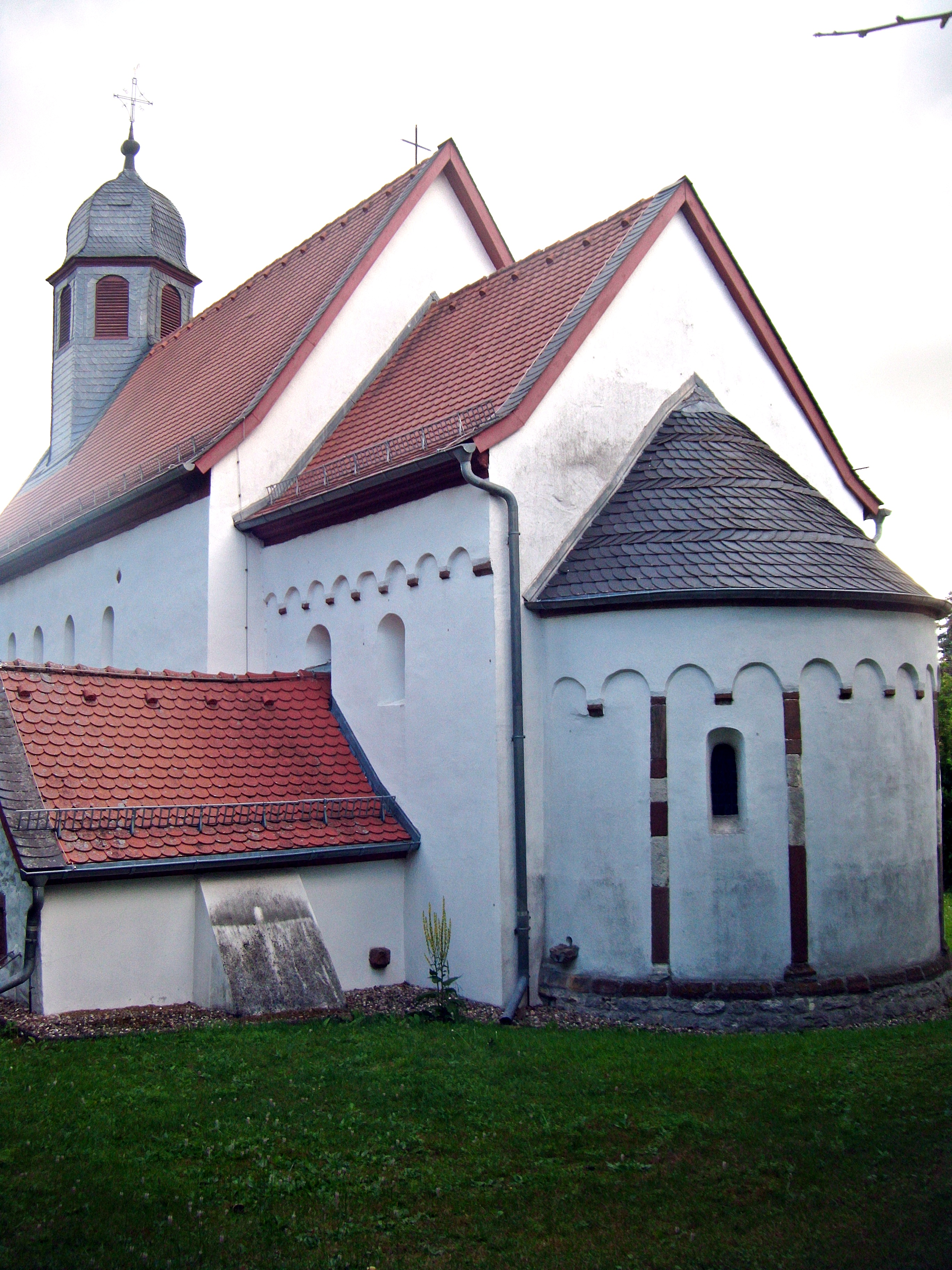 St. Peterskirche Bubenheim (Pfalz), von Osten